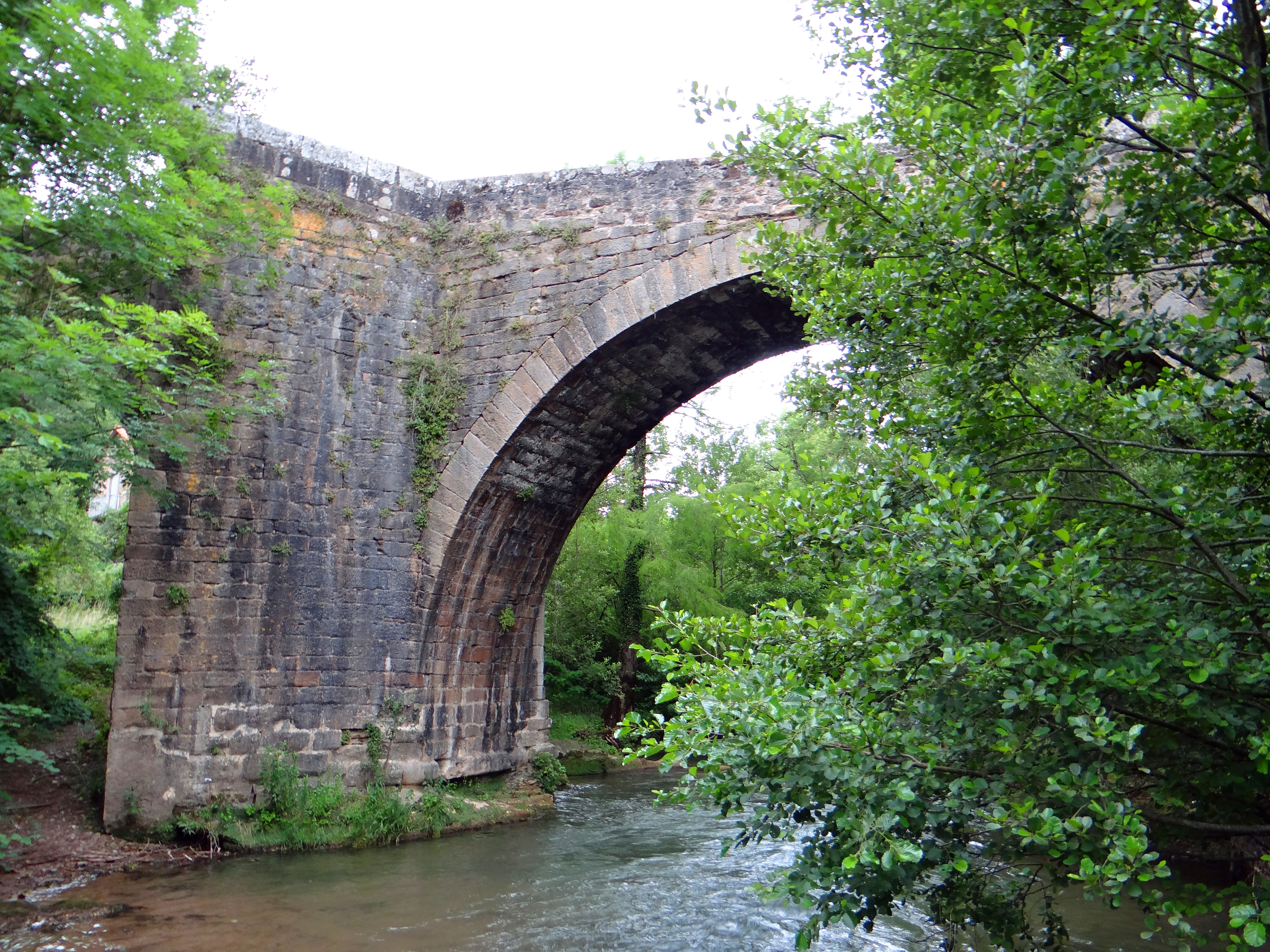 Saint-Félix-de-Sorgues - Pont sur la Sorgues - Vu de l'amont